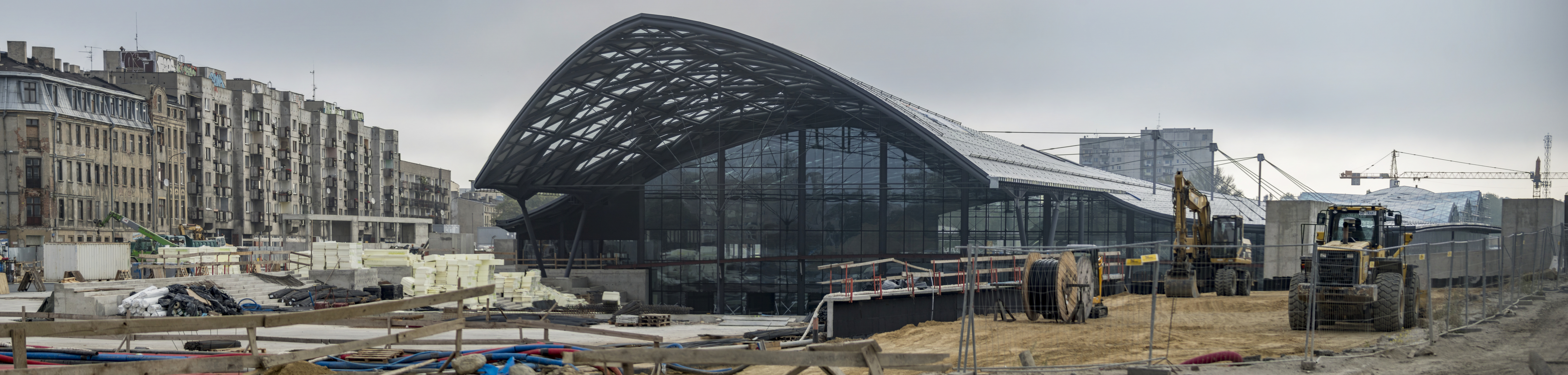 Budowa dworca Łódź Fabryczna pod koniec września 2015 roku.